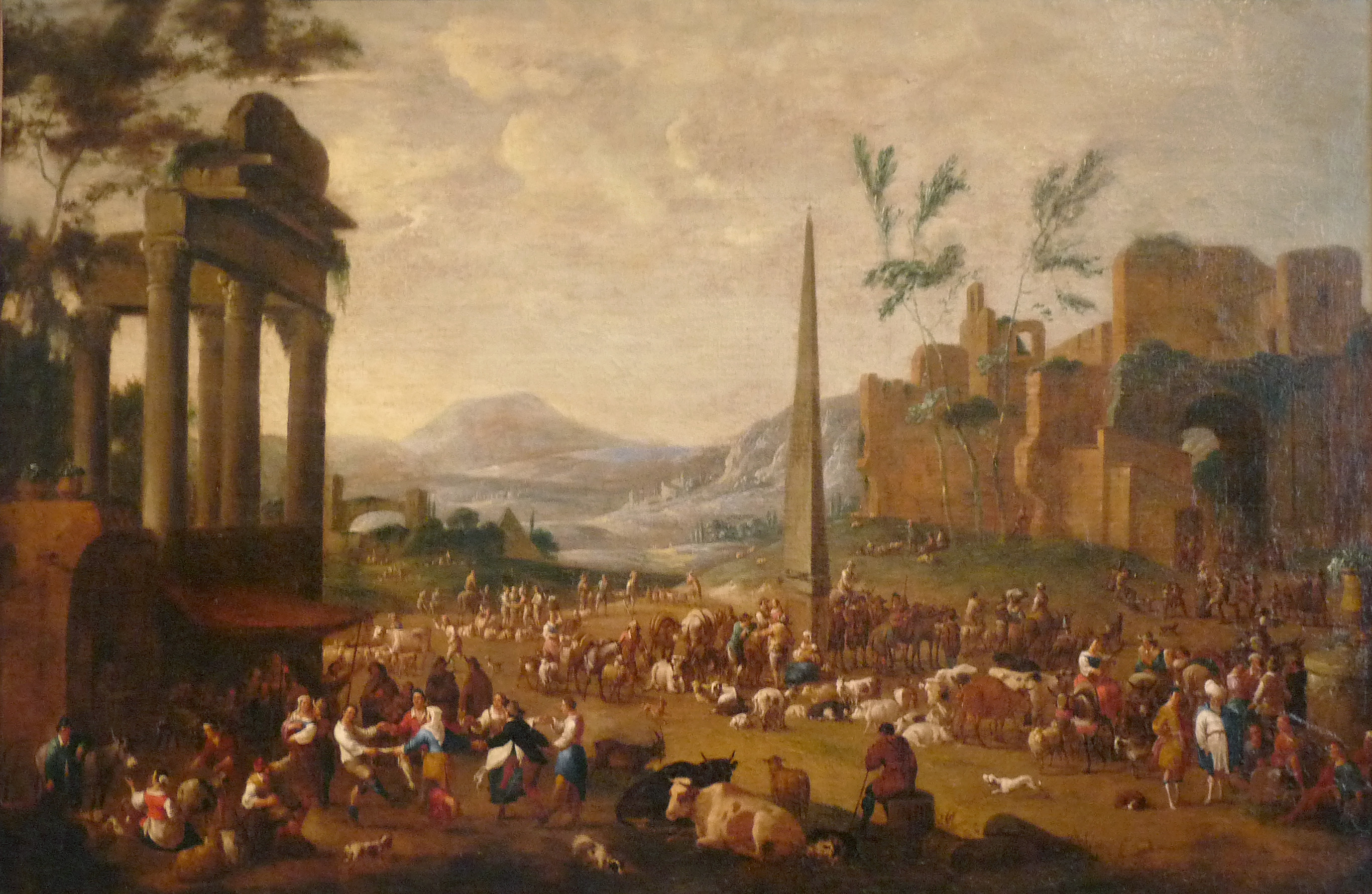 Peter Van Bredael, Foire au Campo Vaccino, Musée barrois